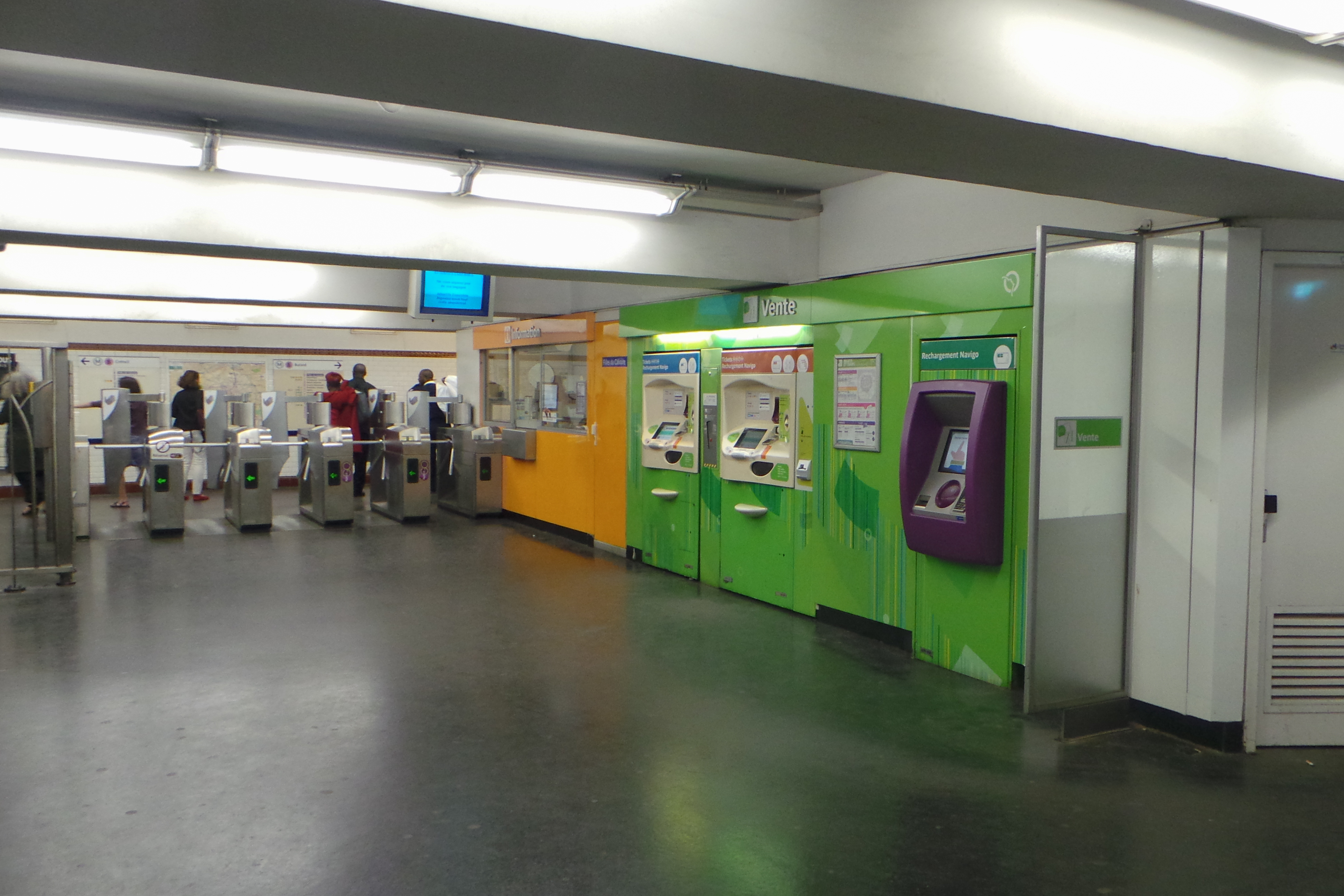 Station de métro Filles du Calvaire, métro de Paris ligne 8, Paris, France